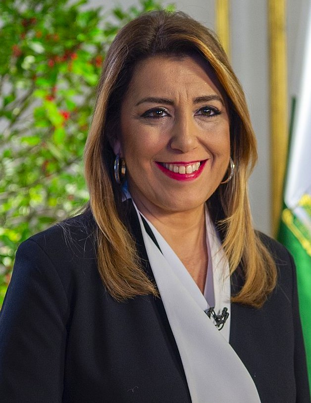 La presidenta de la Junta en funciones, Susana Díaz, durante su mensaje de Fin de Año.